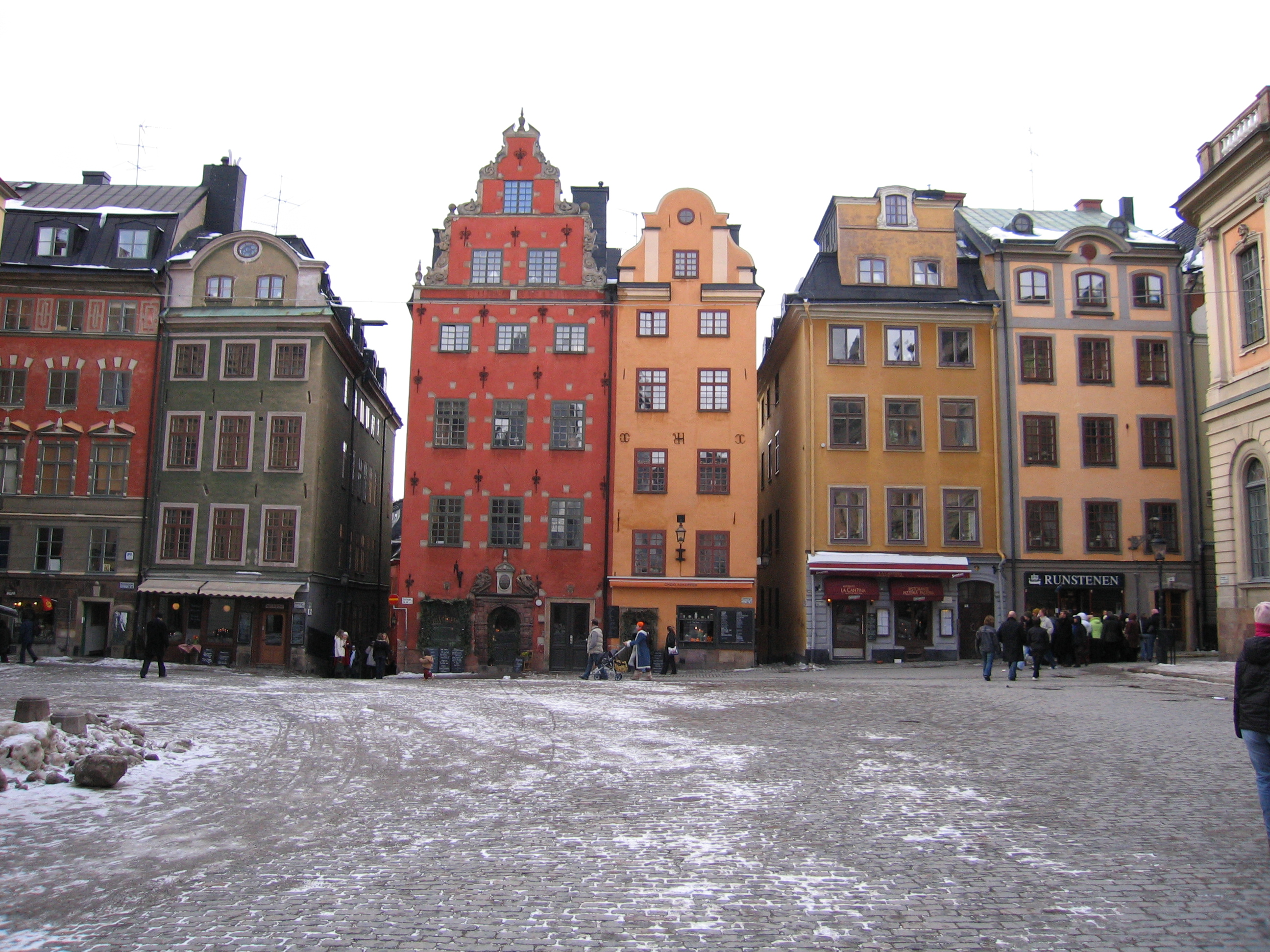 Façades at Stortorget, Gamla stan, Stockholm.